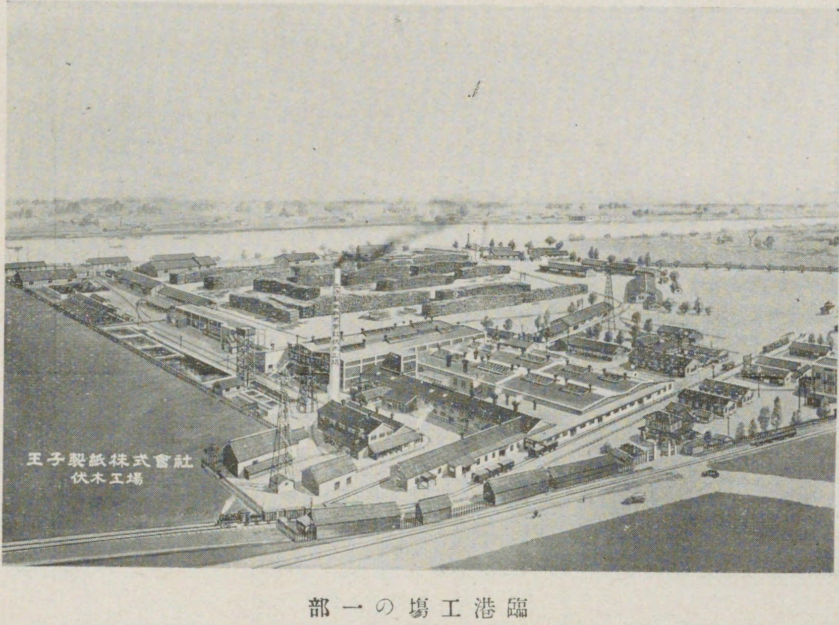 王子製紙株式会社伏木工場